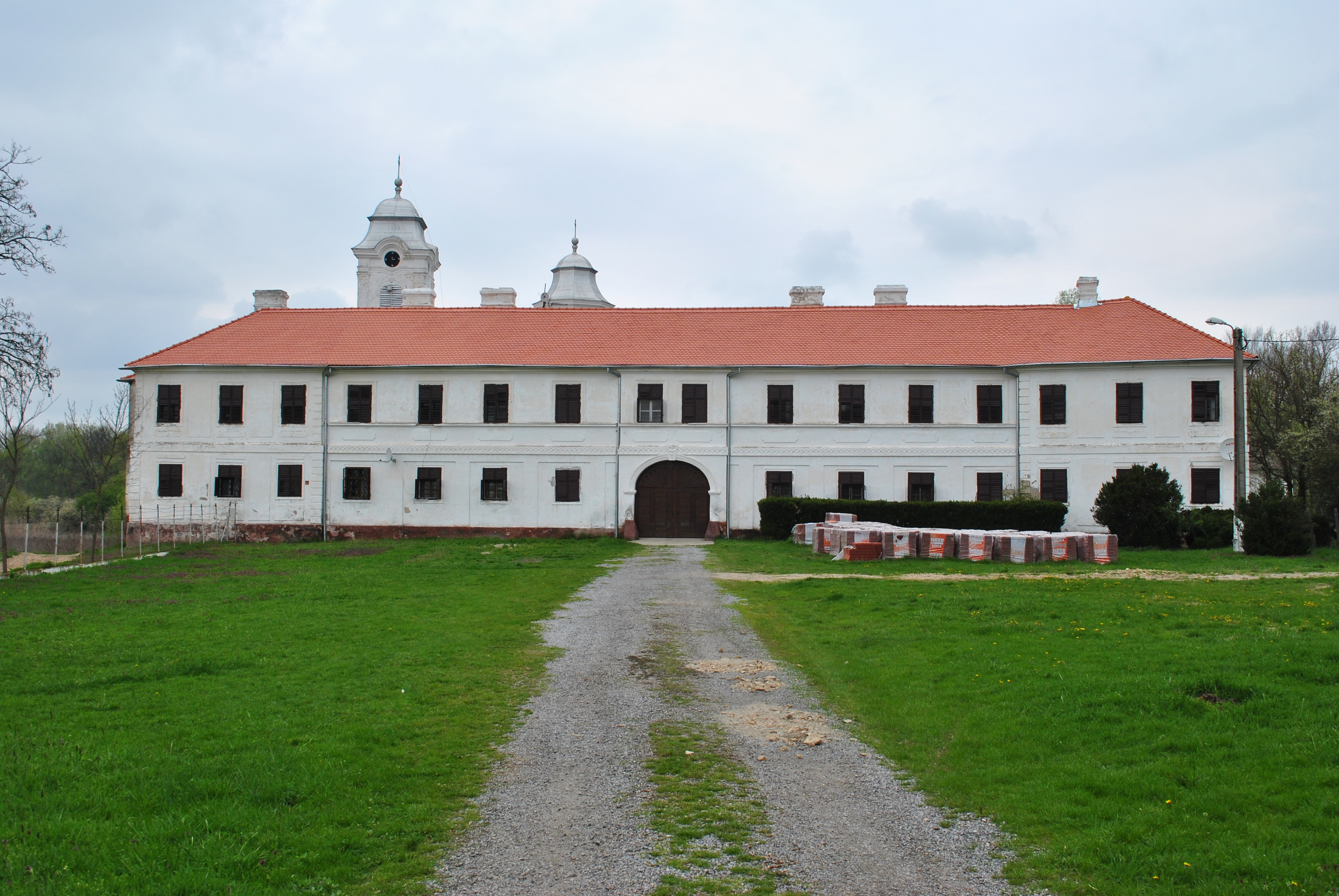 Mănăstirea sârbească Bezdin, sec. XVIII - înc. sec. XIX